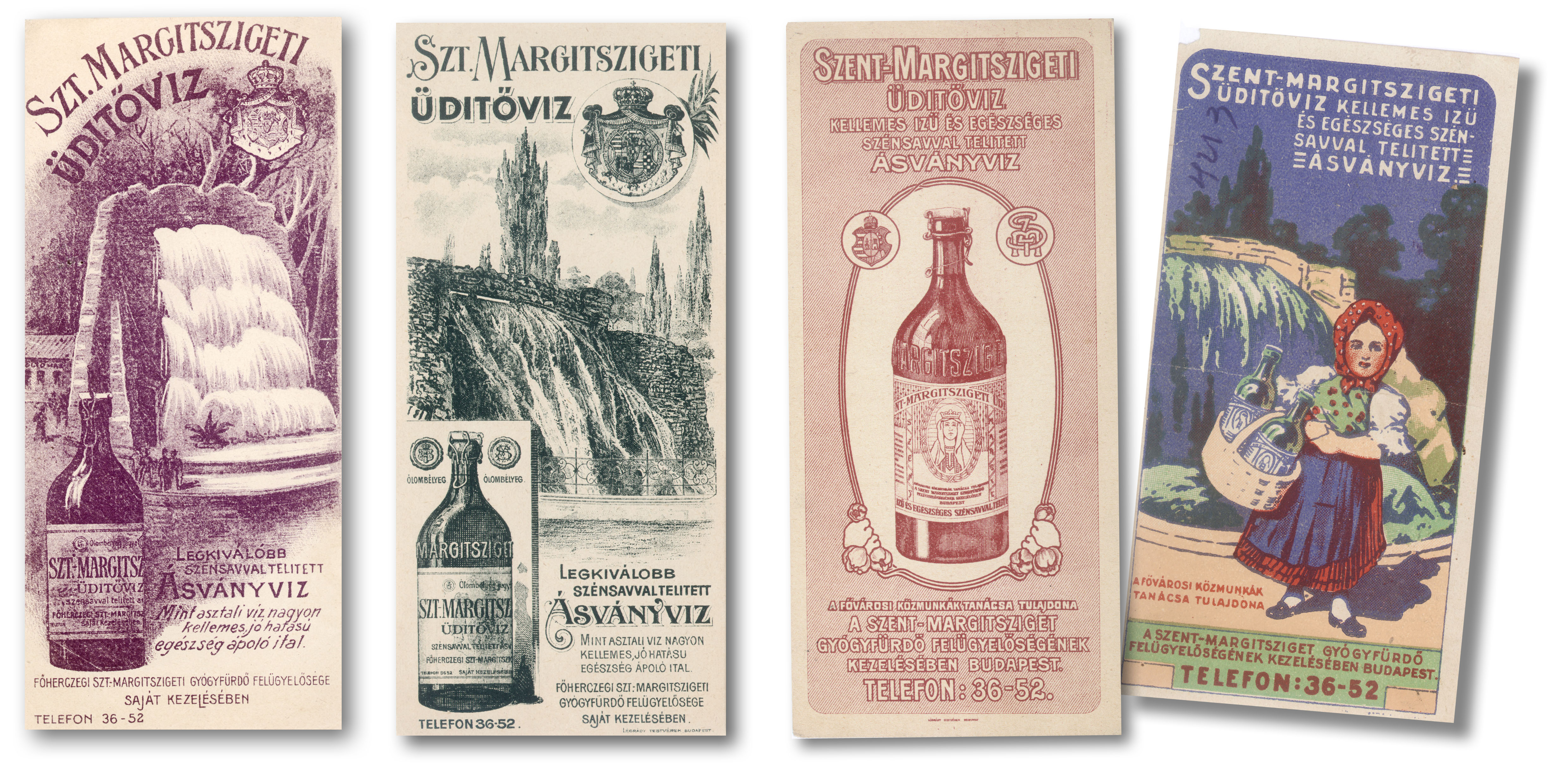 Margitszigeti ásványvíz reklámok 1930 előtt. Budapest.